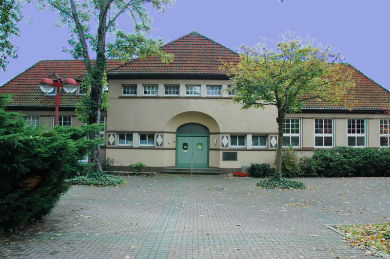 Germany Bergkamen Gedenkstätte NS Sammellager